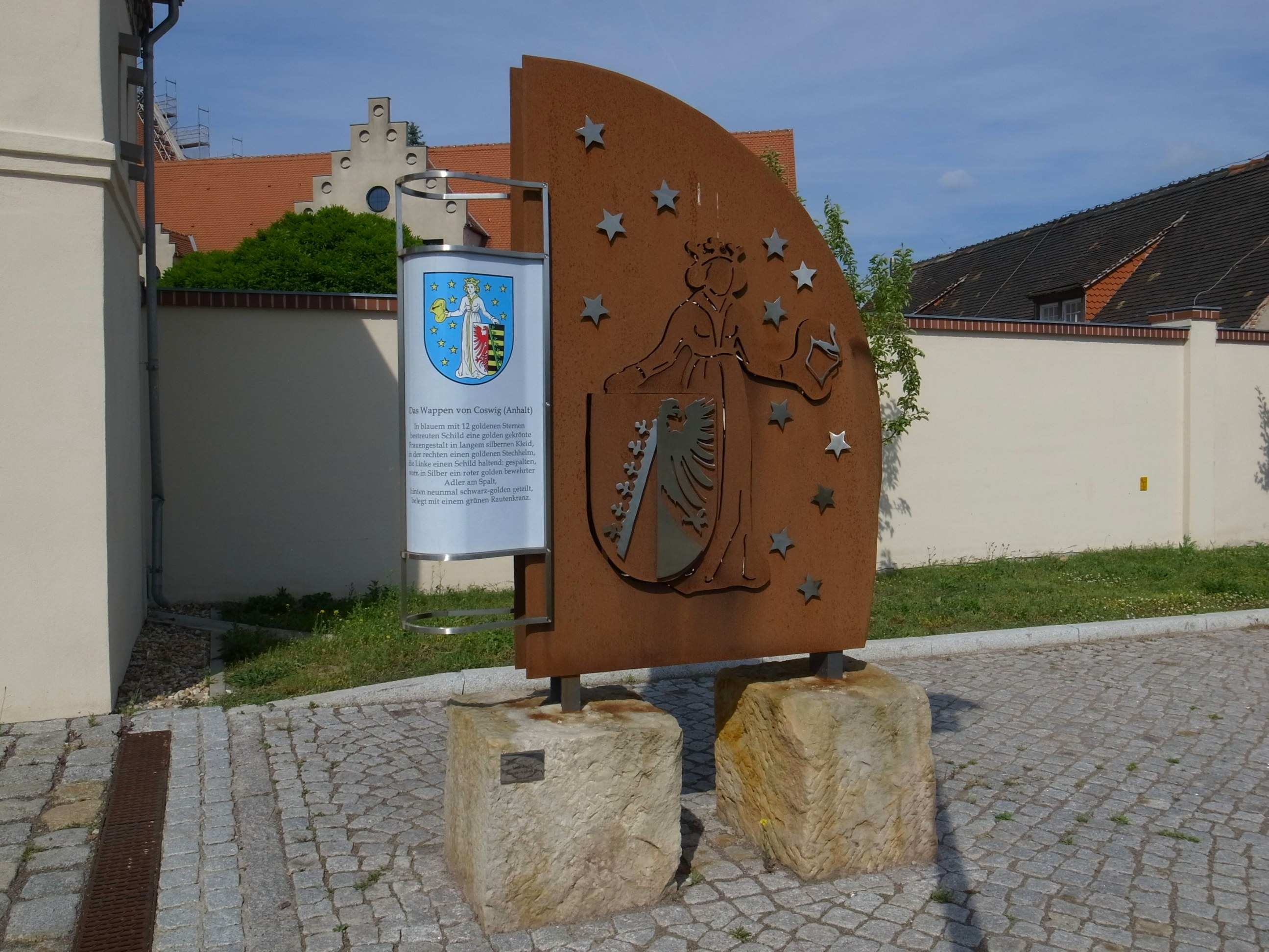 Coswig (Anhalt), Stadtwappen am Klosterhof, ein Geschenk von der Volksbank und Coswiger Firmen zum 825. Jubiläum der Stadt. (Quelle